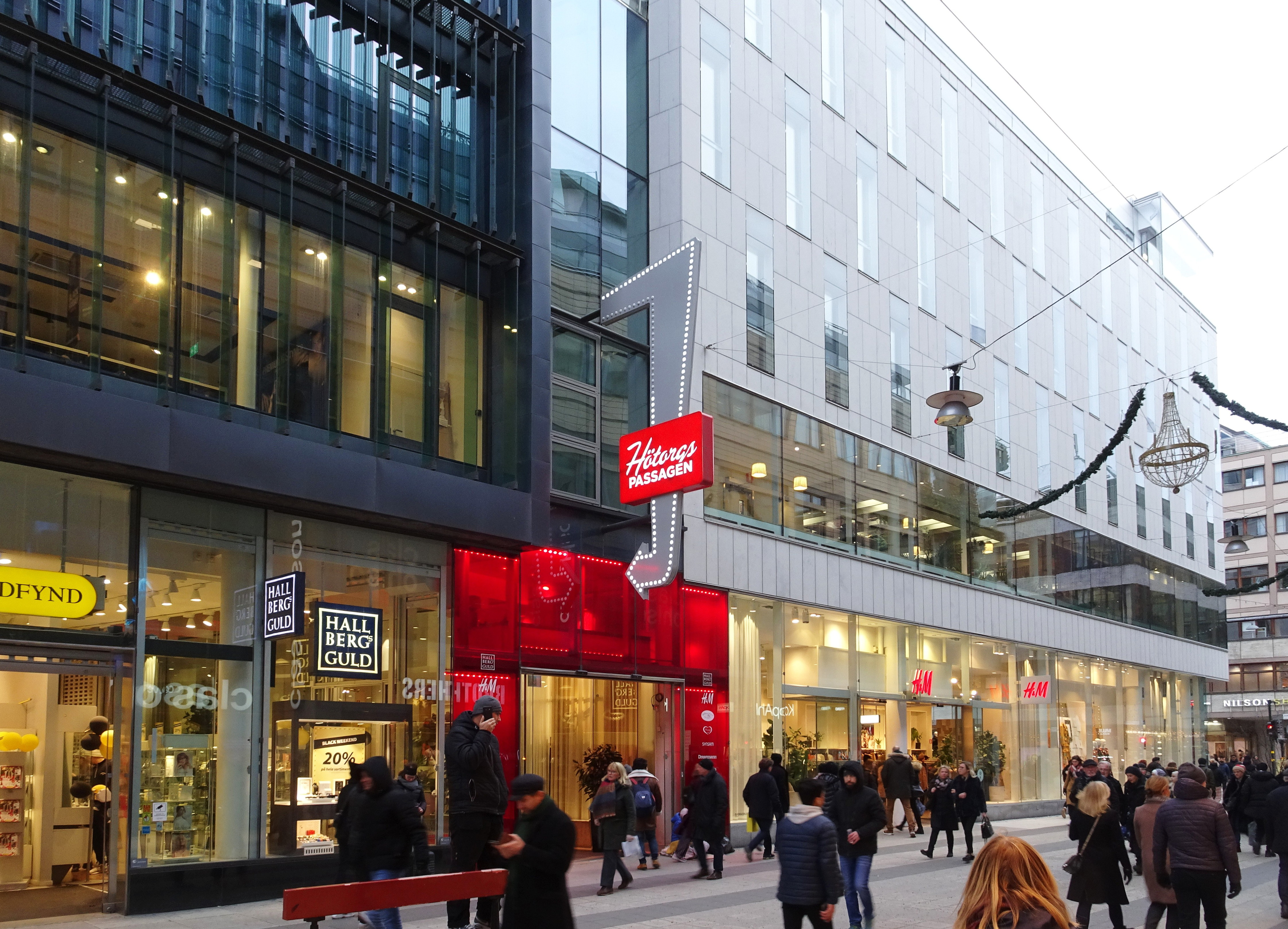 Drottninggatan, kvarteret Adam och Eva , söderut